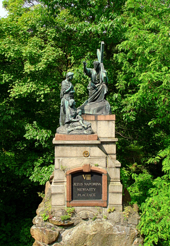 Zespół klasztorny oo. Paulinów: Kościół pw. Wniebowzięcia NMP i Znalezienia Krzyża Św. z kaplicami, zakrystią, skarbcem, wieżą, klasztorem, zabudowaniami gospodarczymi, arsenałem, drukarnią, domem muzykantów, twierdzą z bramami i bastionami, park Częstochowa, Częstochowa 02.1978.